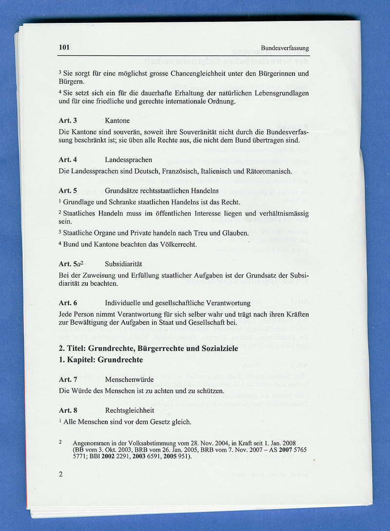 Bundesverfassung Schweiz, auf blauen Untergrund